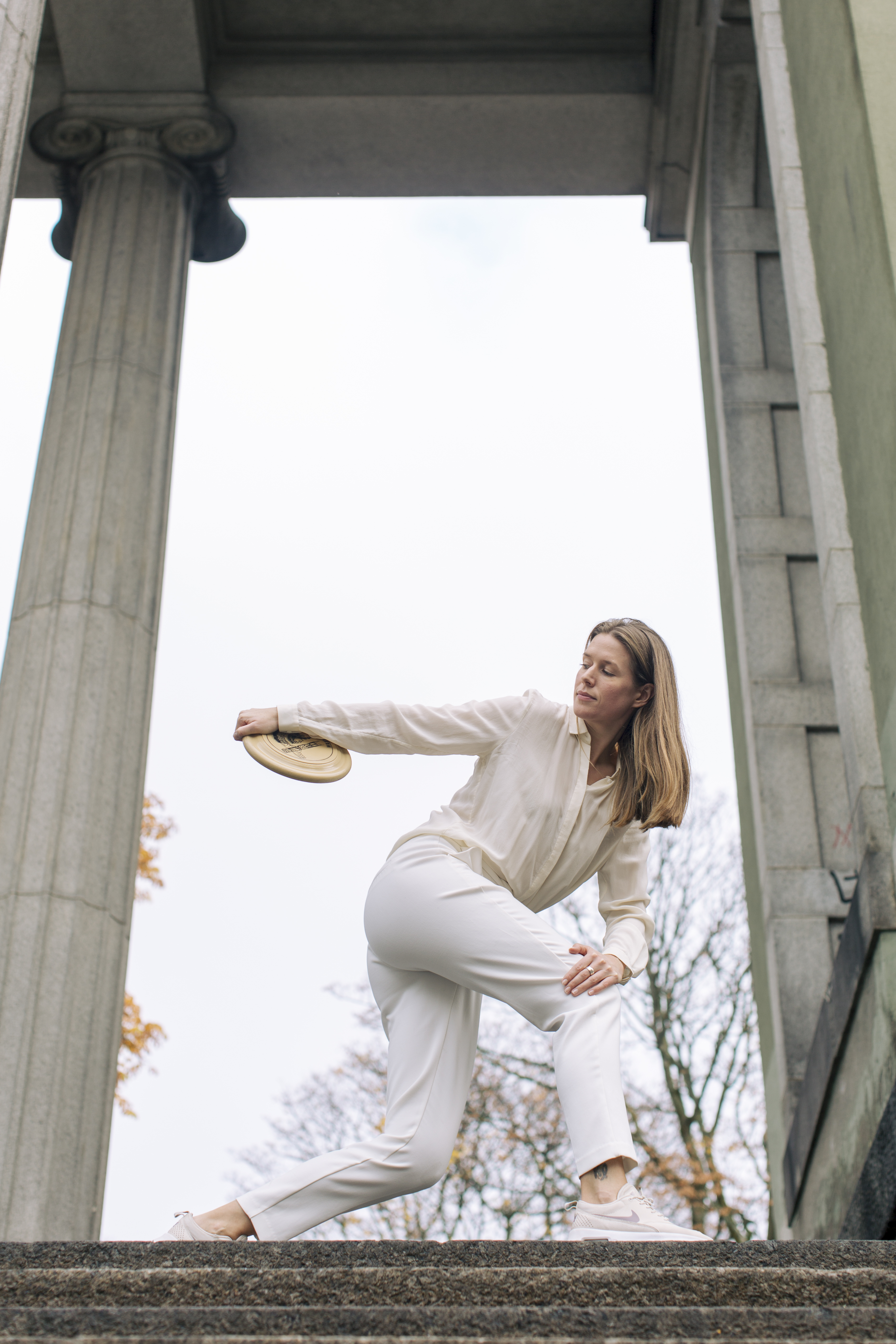 Silje Sigurdsen